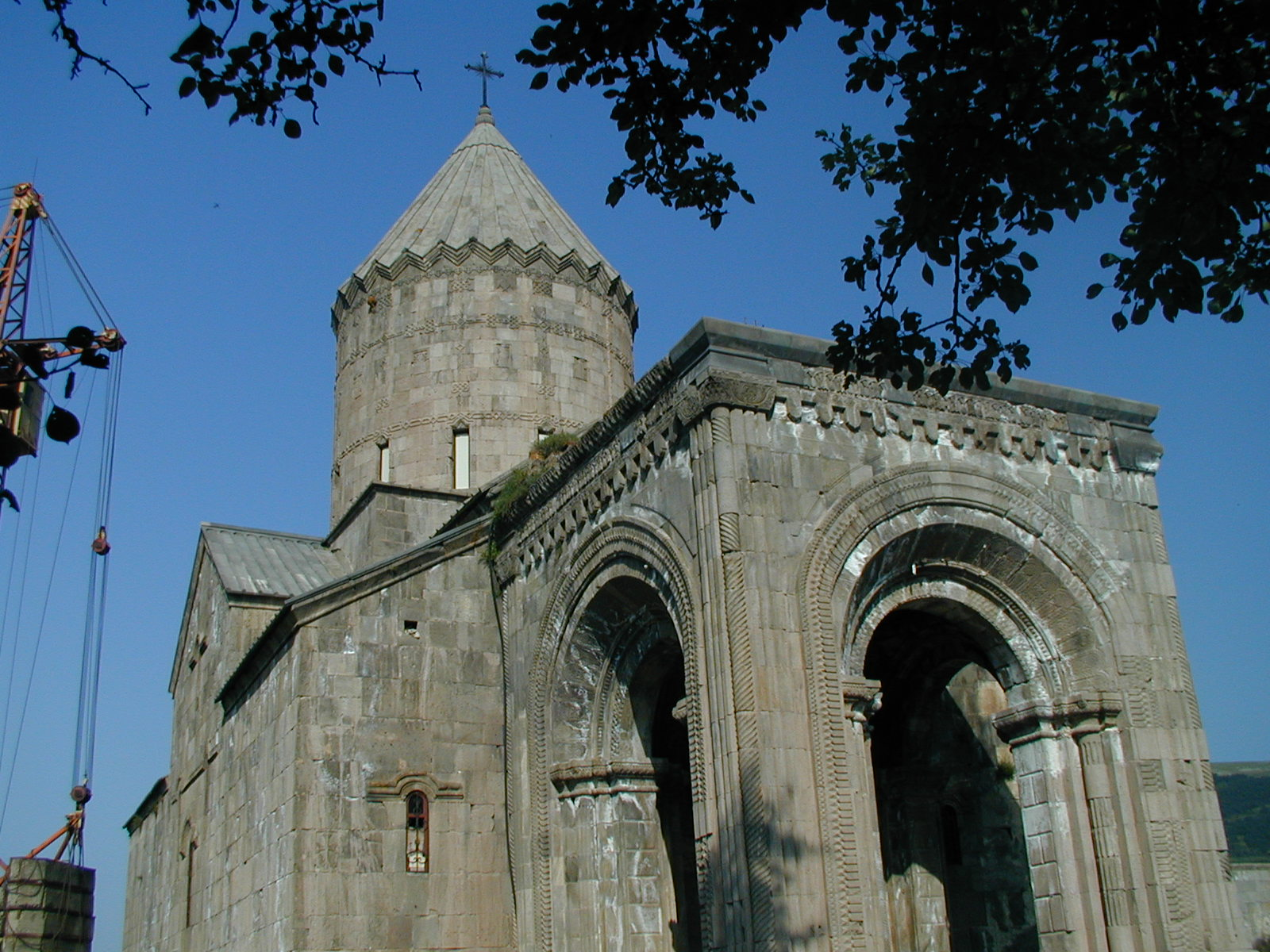 Monasterie Tatev (St. Peter and Paul)